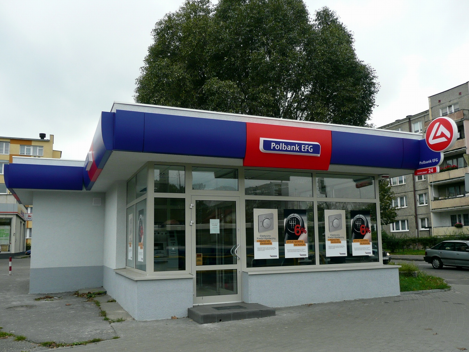 Oddział Polbanku EFG w Bydgoszczy, ul. Skłodowskiej-Curie 64a